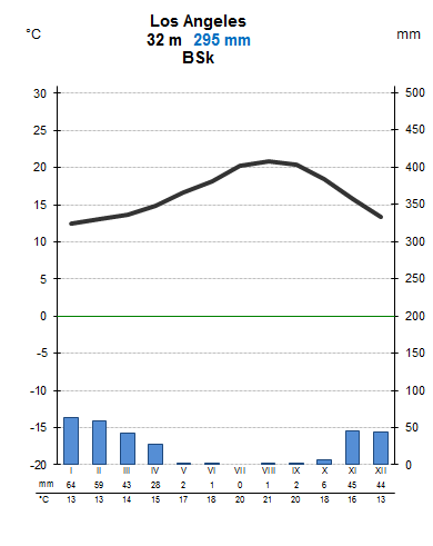 See on Los Angelisse kliimadiagramm